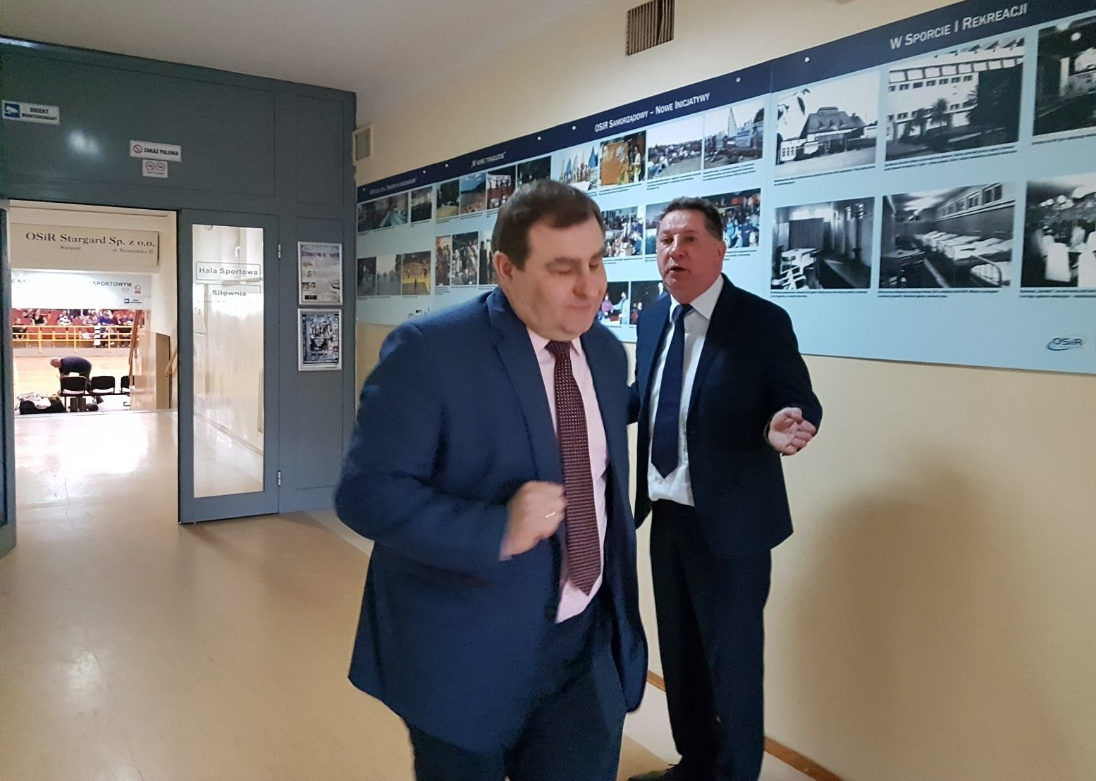 Krzysztof Koziorowicz i komisarz